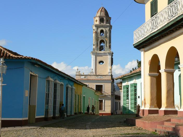 Clocher de l'église St François d'Assise à Trinidad, Cuba.